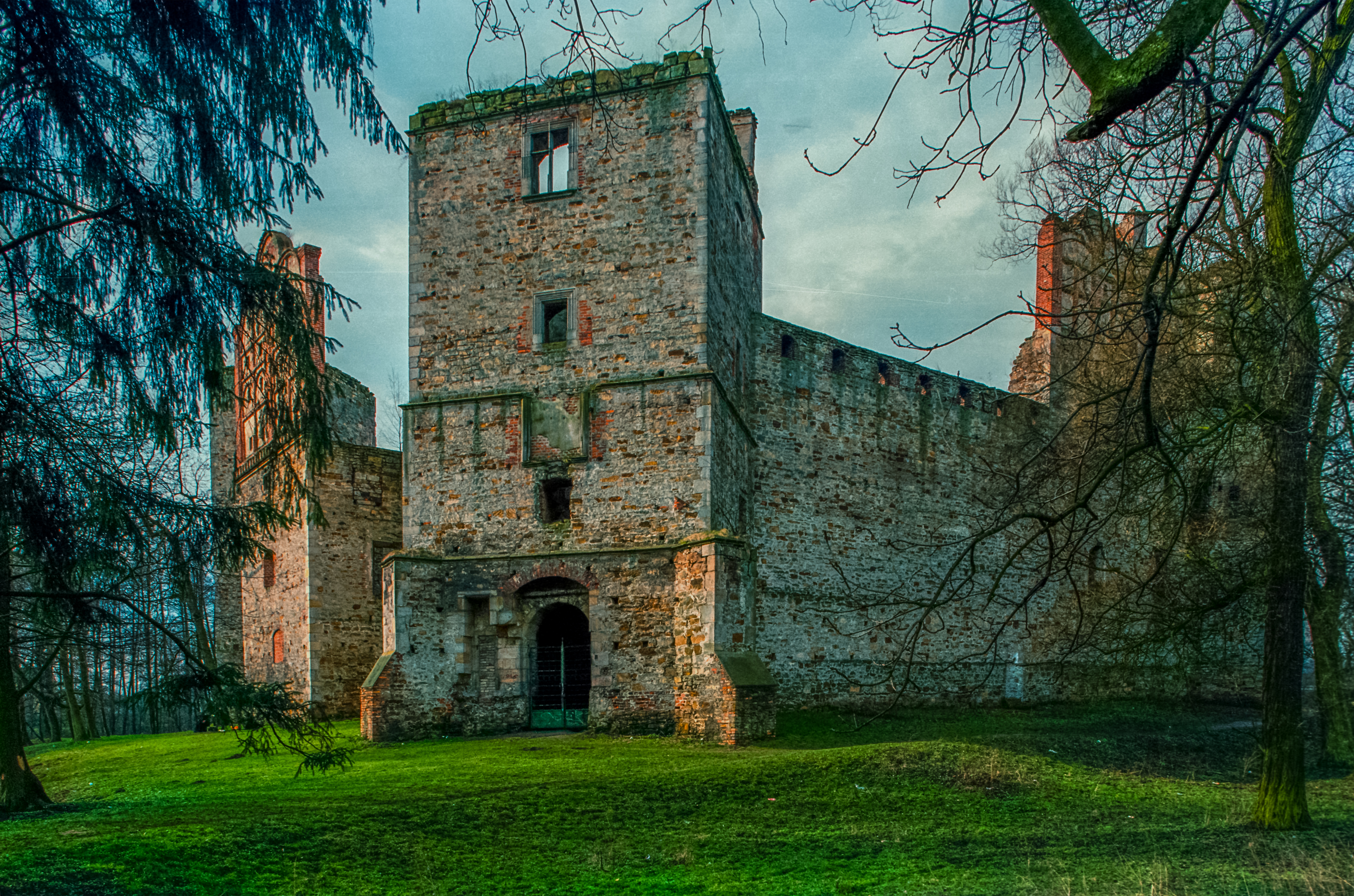 Drzewica, ruiny zamku